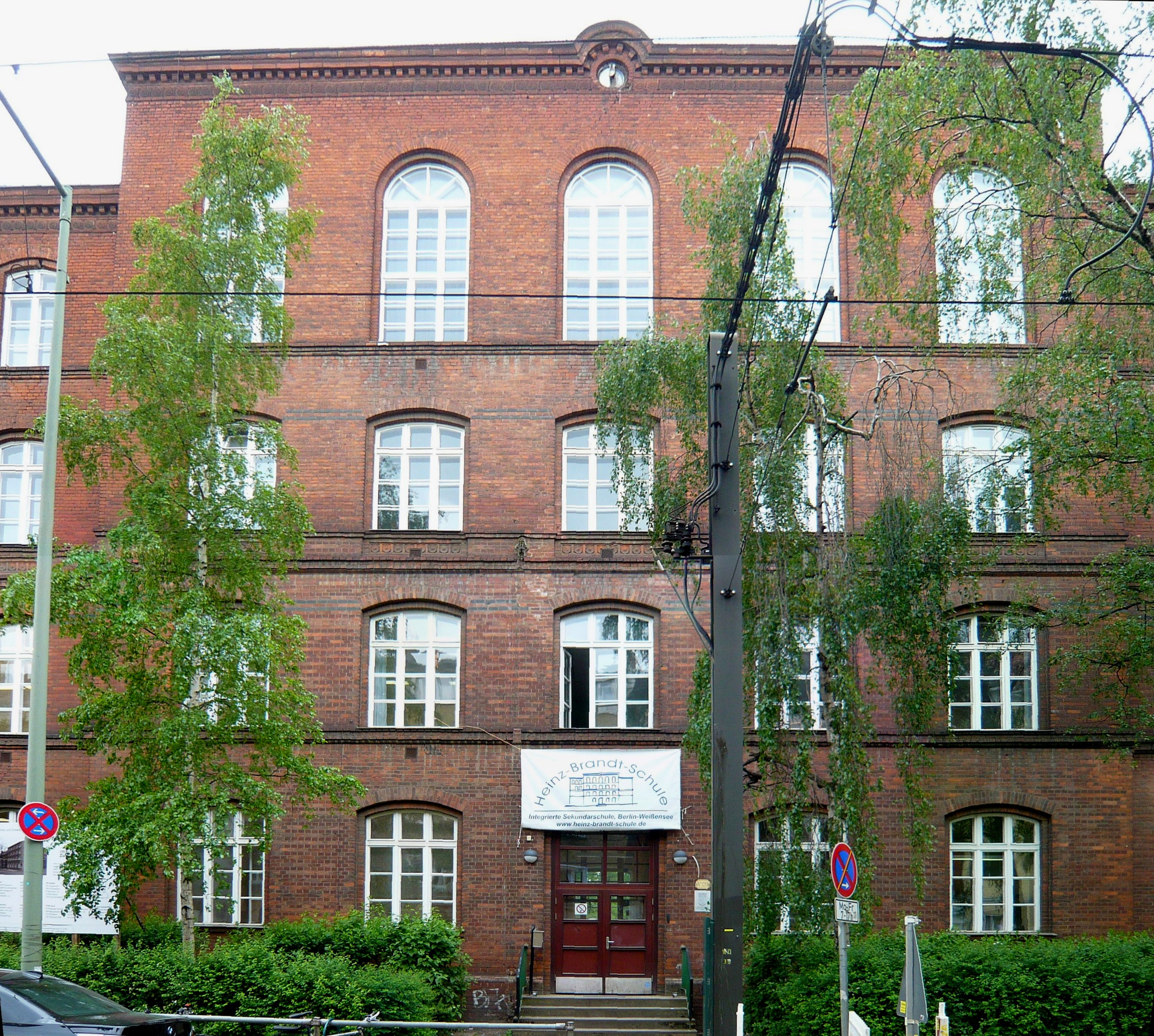 Weißensee, Langhansstr.